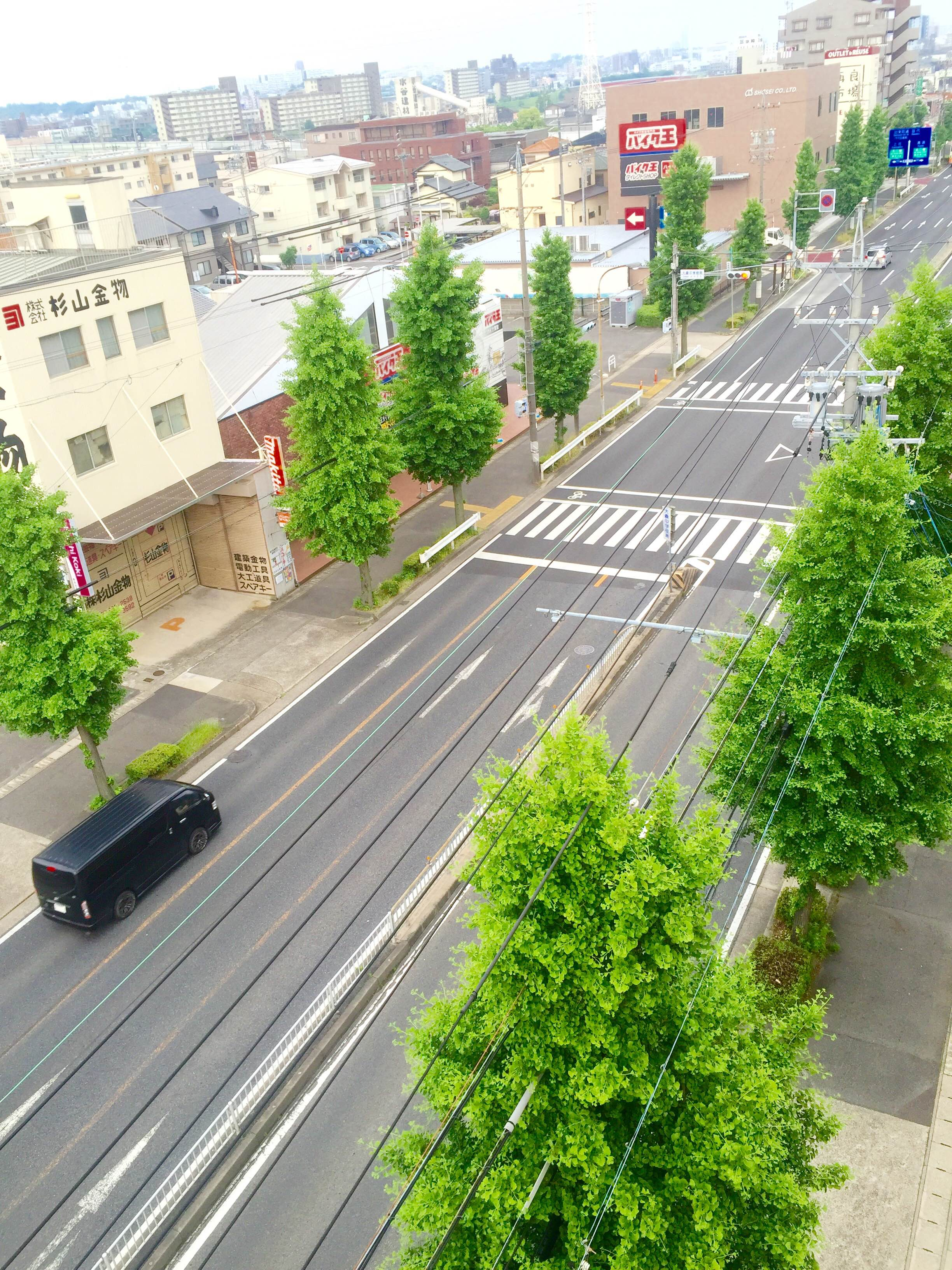 大森城があったとされる場所